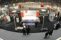 Bystronic Stand EuroBlech 2008 Hannover, Deutschland